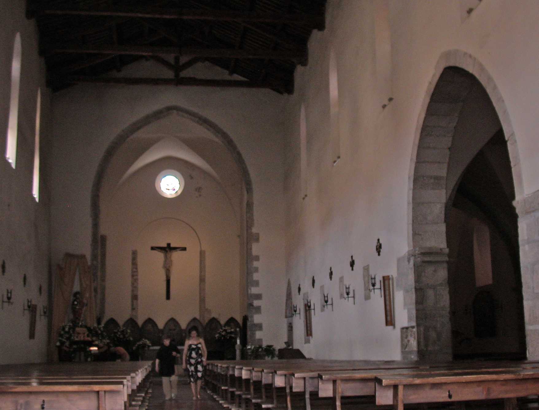 Fondi (provincia di Latina, Lazio, Italia), chiesa e convento di San Francesco.